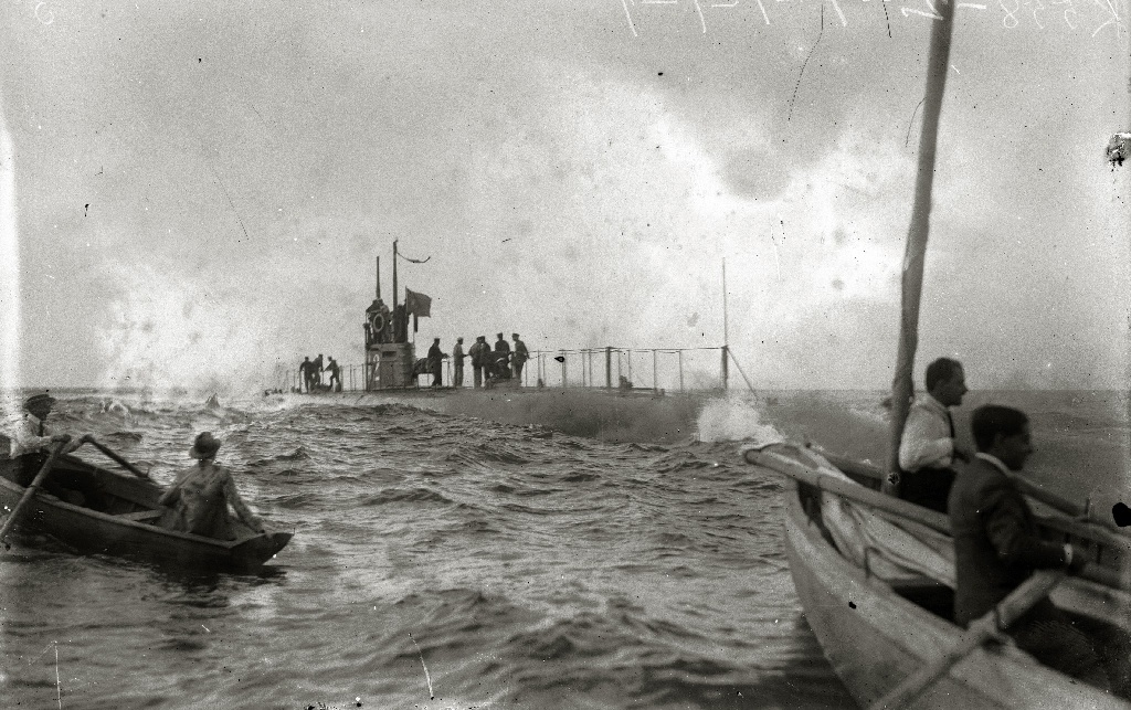 Título original: El submarino militar 'Isaac Peral' en la bahía de la Concha (2/3) Localización: San Sebastián (Guipúzcoa)